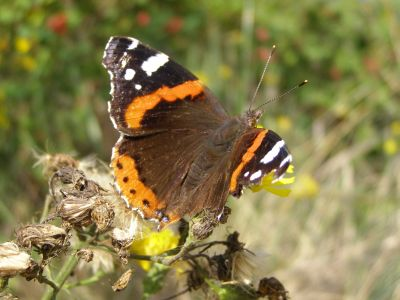 Vanessa atalanta